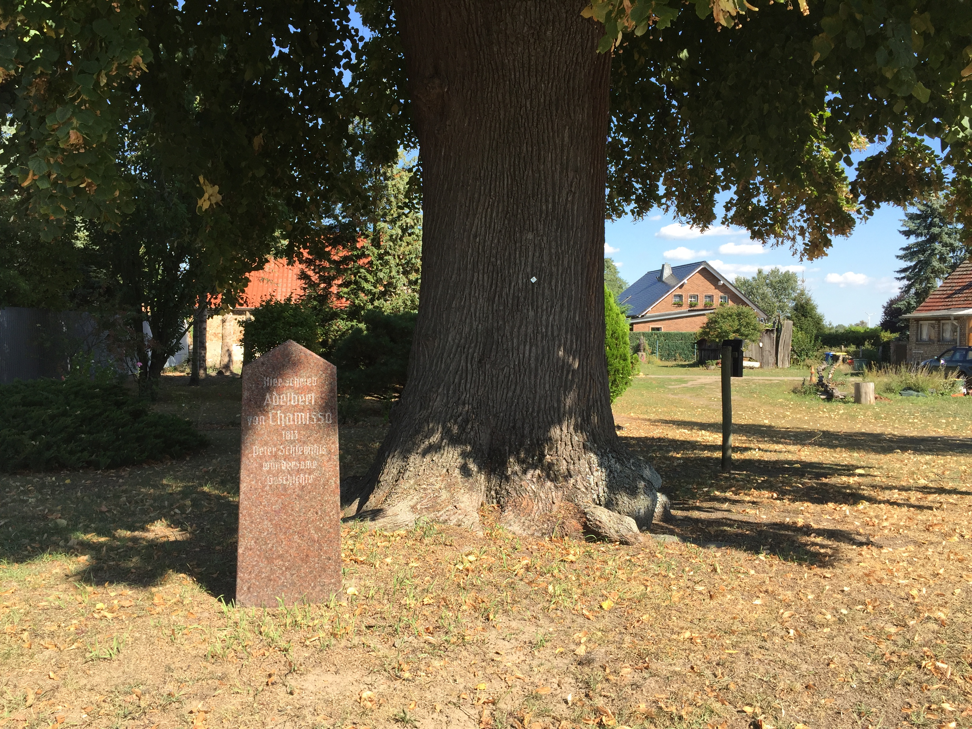 Schlosspark Kunersdorf (Bliesdorf)